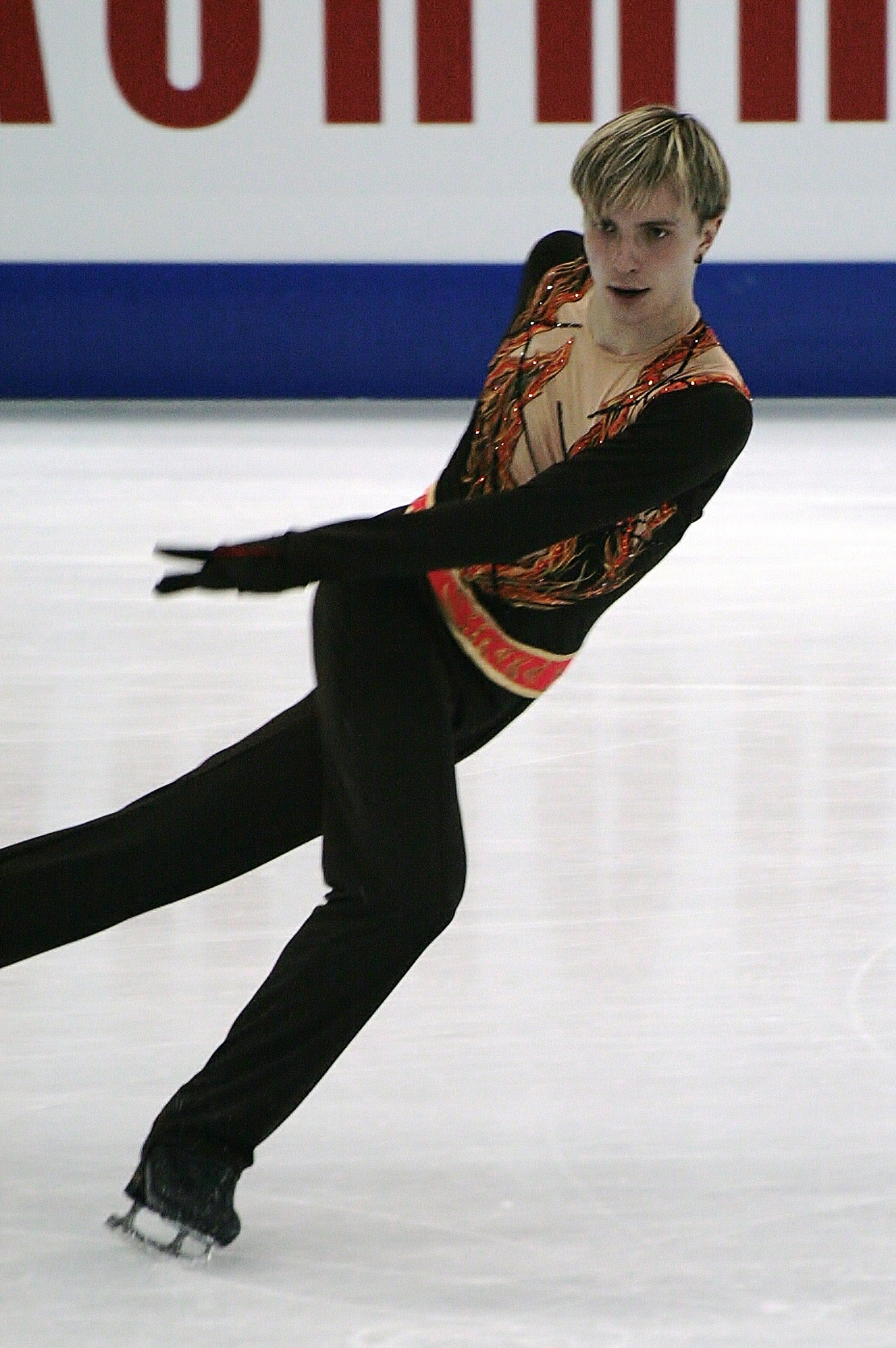 Дмитрий Игнатенко (Украина) на чемпионате мира по фигурному катанию 2012.